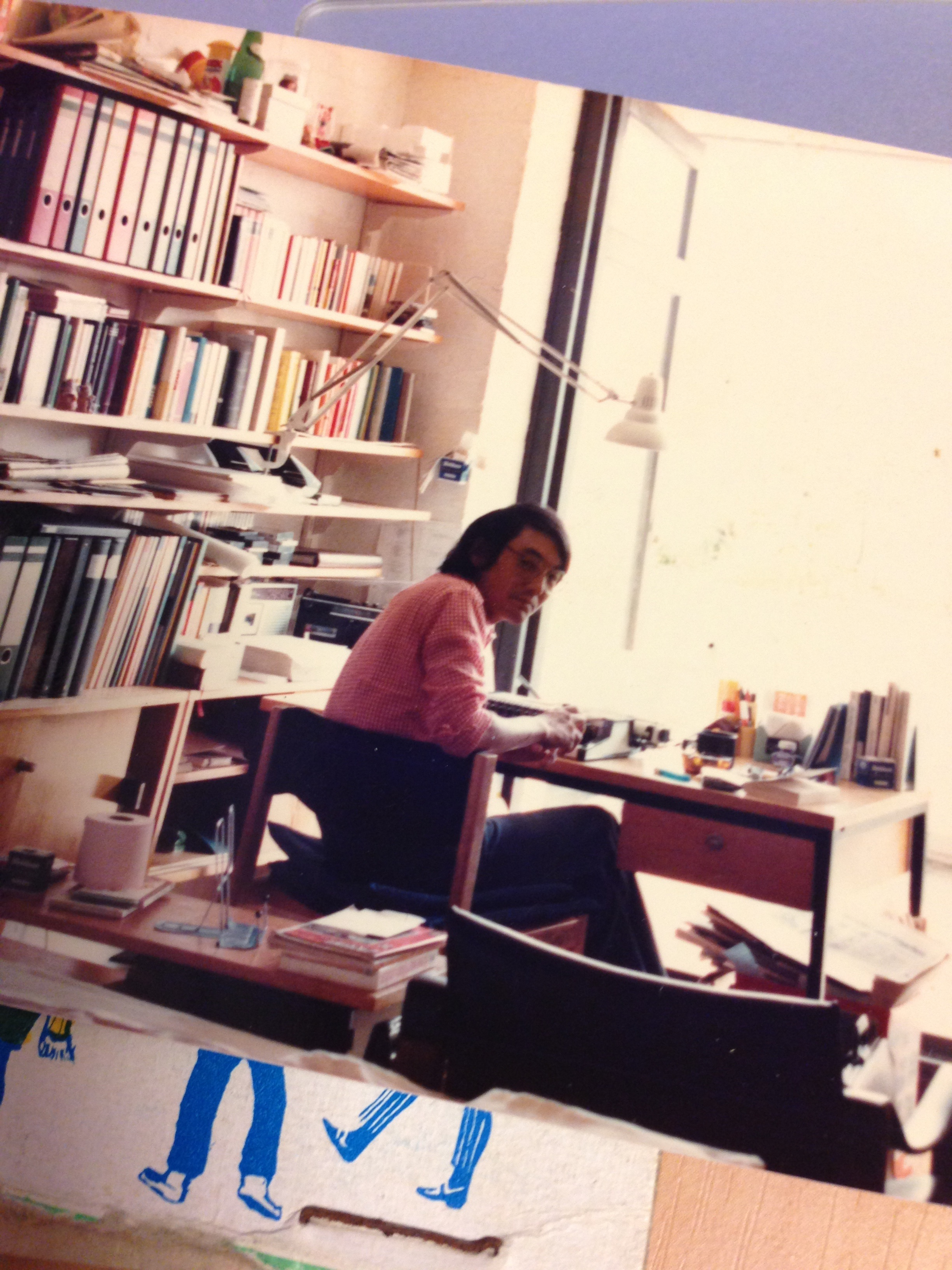 関口一郎ドイツ書斎にて